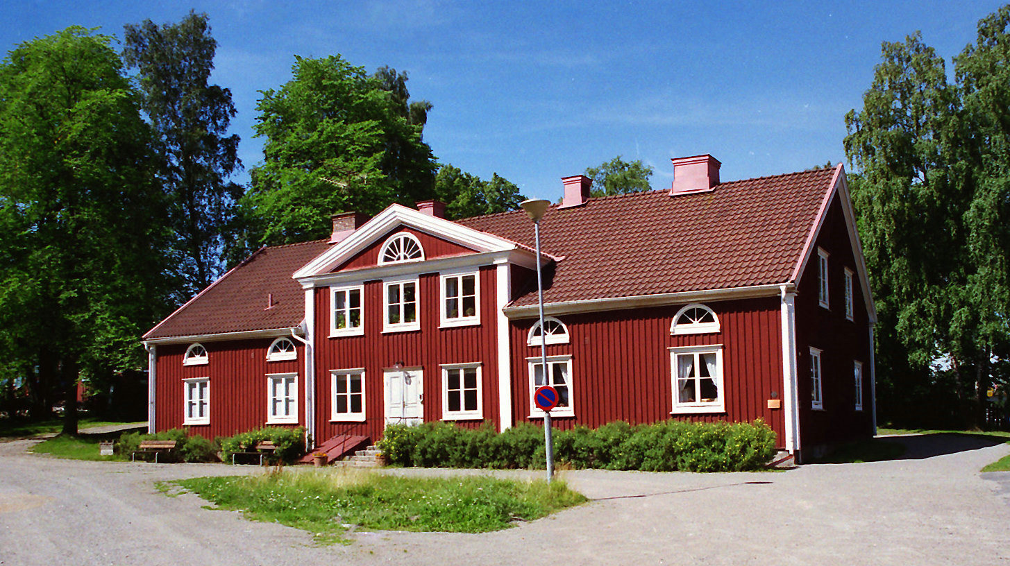 Domprostgården i Växjö, Pär Lagerkvists födelsehem